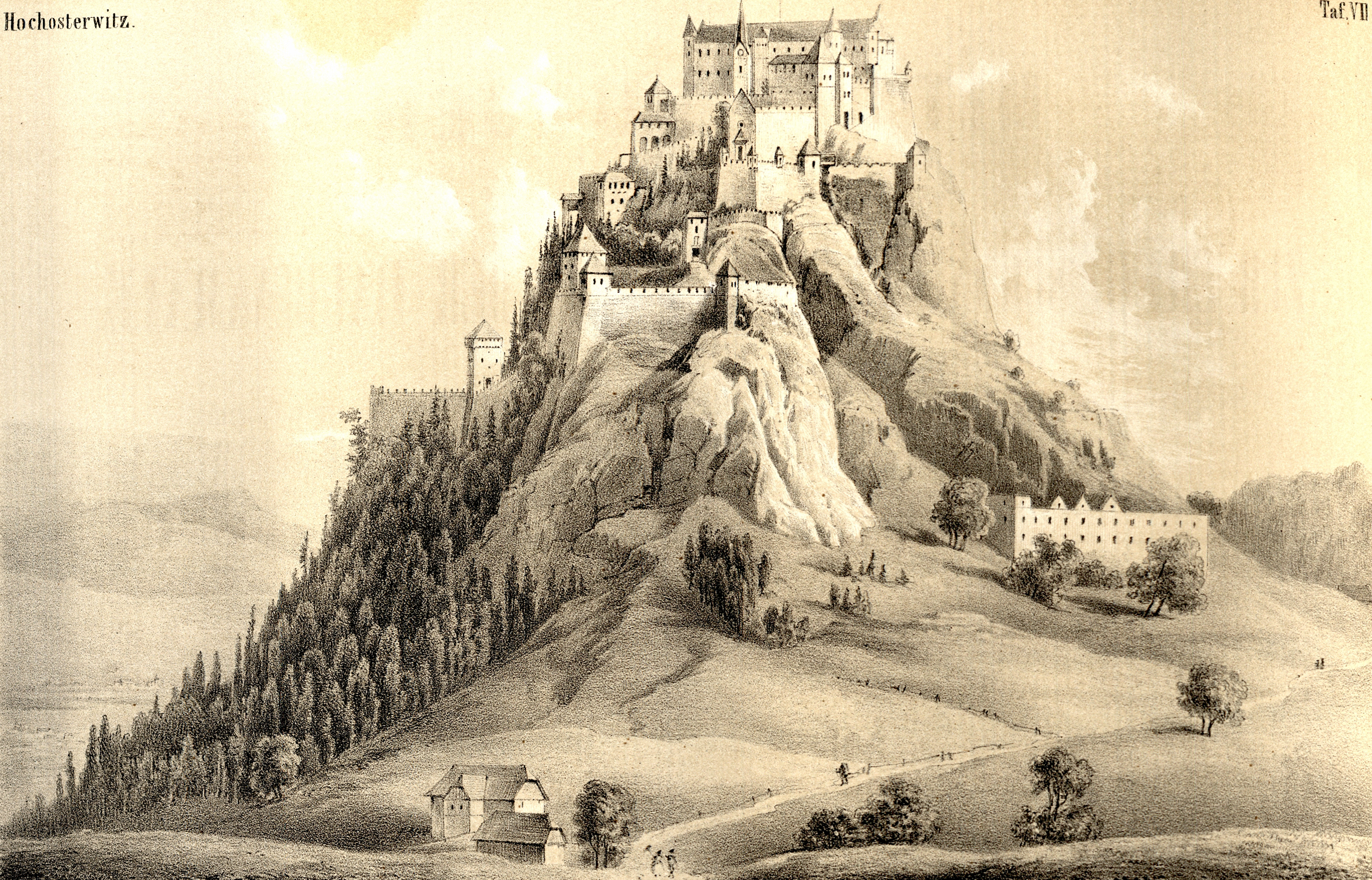 Holzschnitt aus den Mittheilungen der kaiserl. königl. Central-Commission zur Erforschung und Erhaltung der Baudenkmale Band 5, September 1860. Beitrag von Josef Edler von Scheiger mit dem Titel: „Hochosterwitz in Kärnthen“, S. 244-265 Druck: k. k. Hof- und Staatsdruckerei Zuordnung der Zeichnungen entsprechend dem Dateinamen